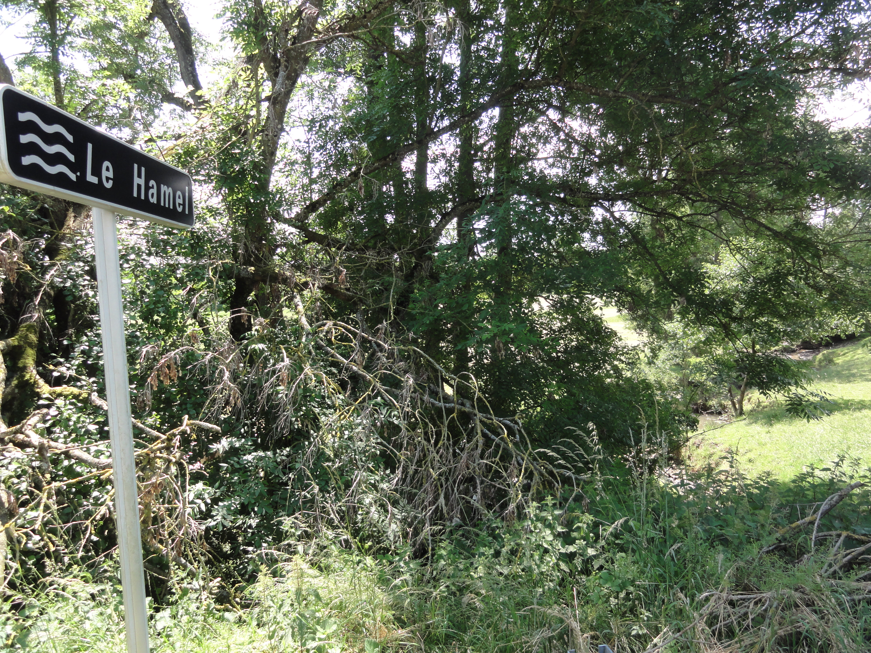 Brunehamel (Aisne) rivierè le Hamel